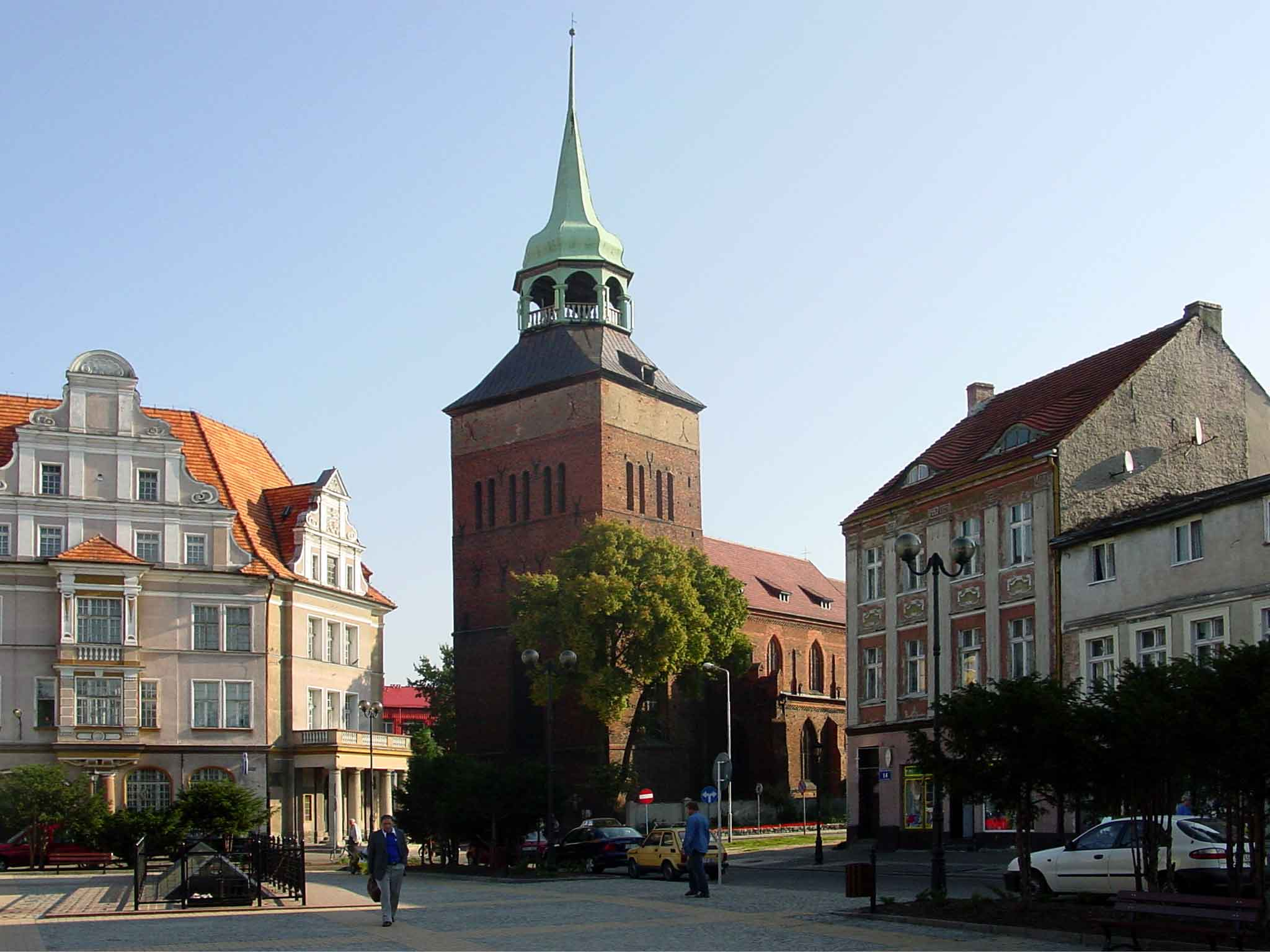 Kościół NMP, Białogard, autor zdjęcia Kluka, 12.10.2003r.